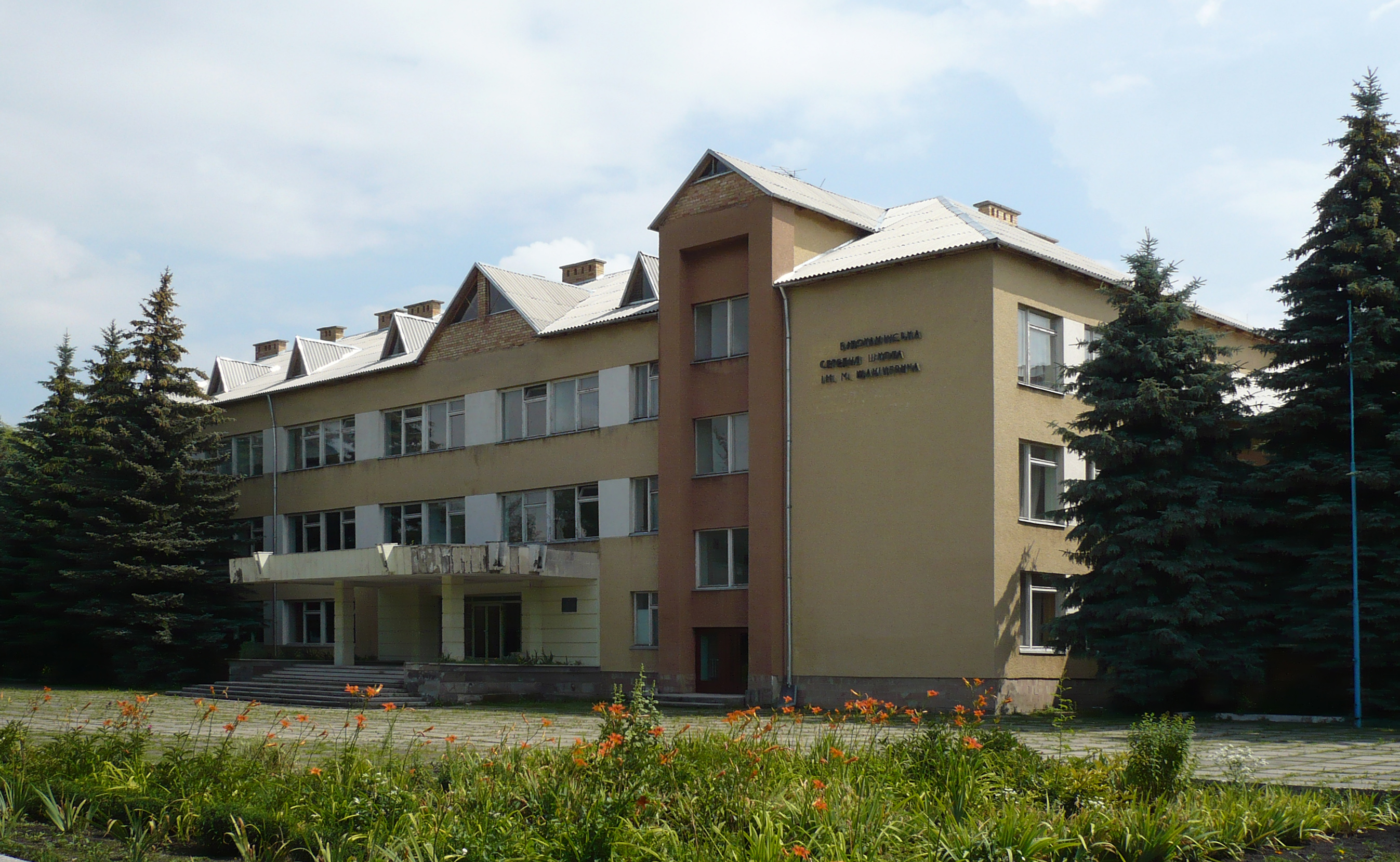 Biały Kamień na Ukrainie - szkoła średnia